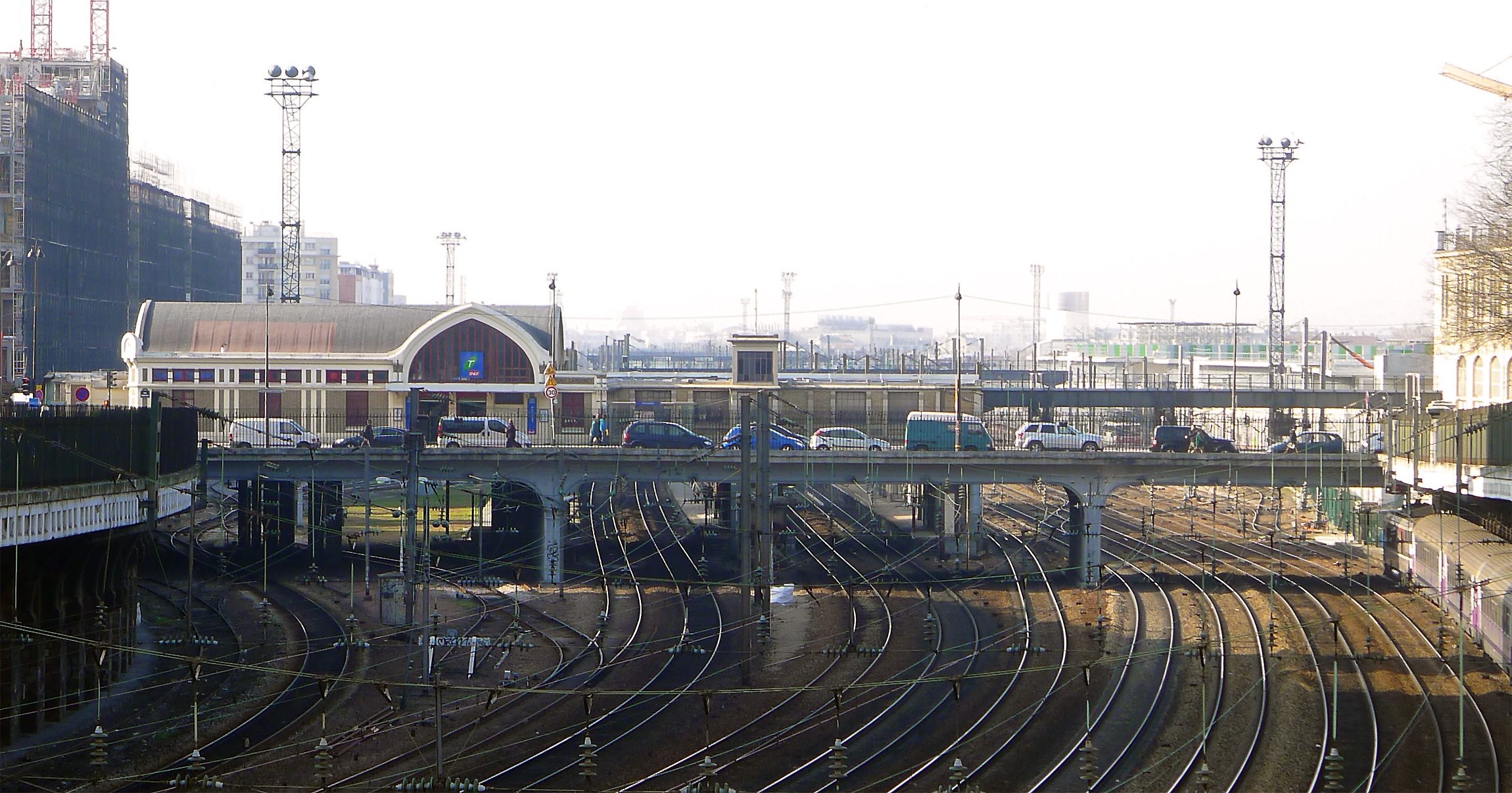 Gare du Pont-Cardinet - Paris XVII